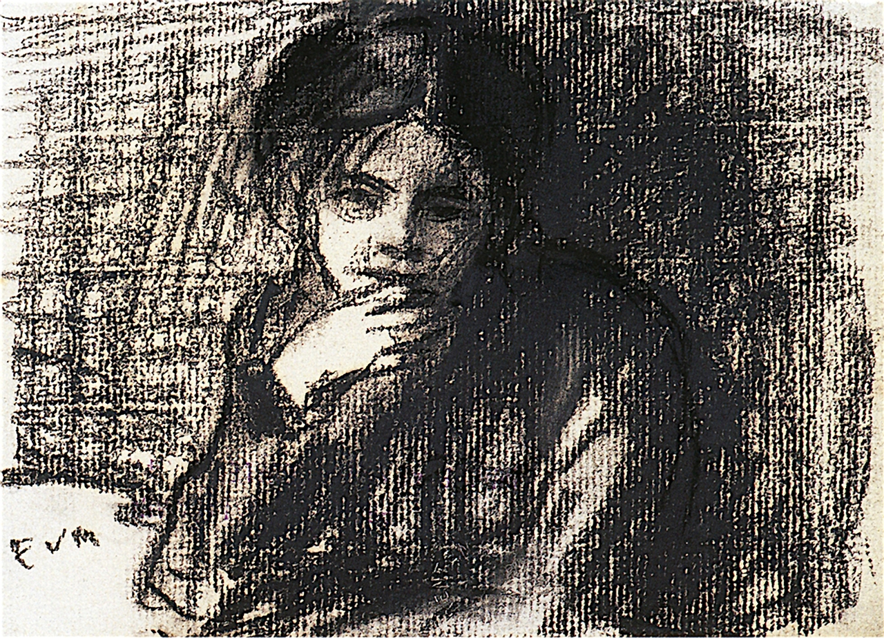 Belgian artist Eugeen van Mieghem (1875-1930). ================= Belgian artist Eugeen van Mieghem (1875-1930).